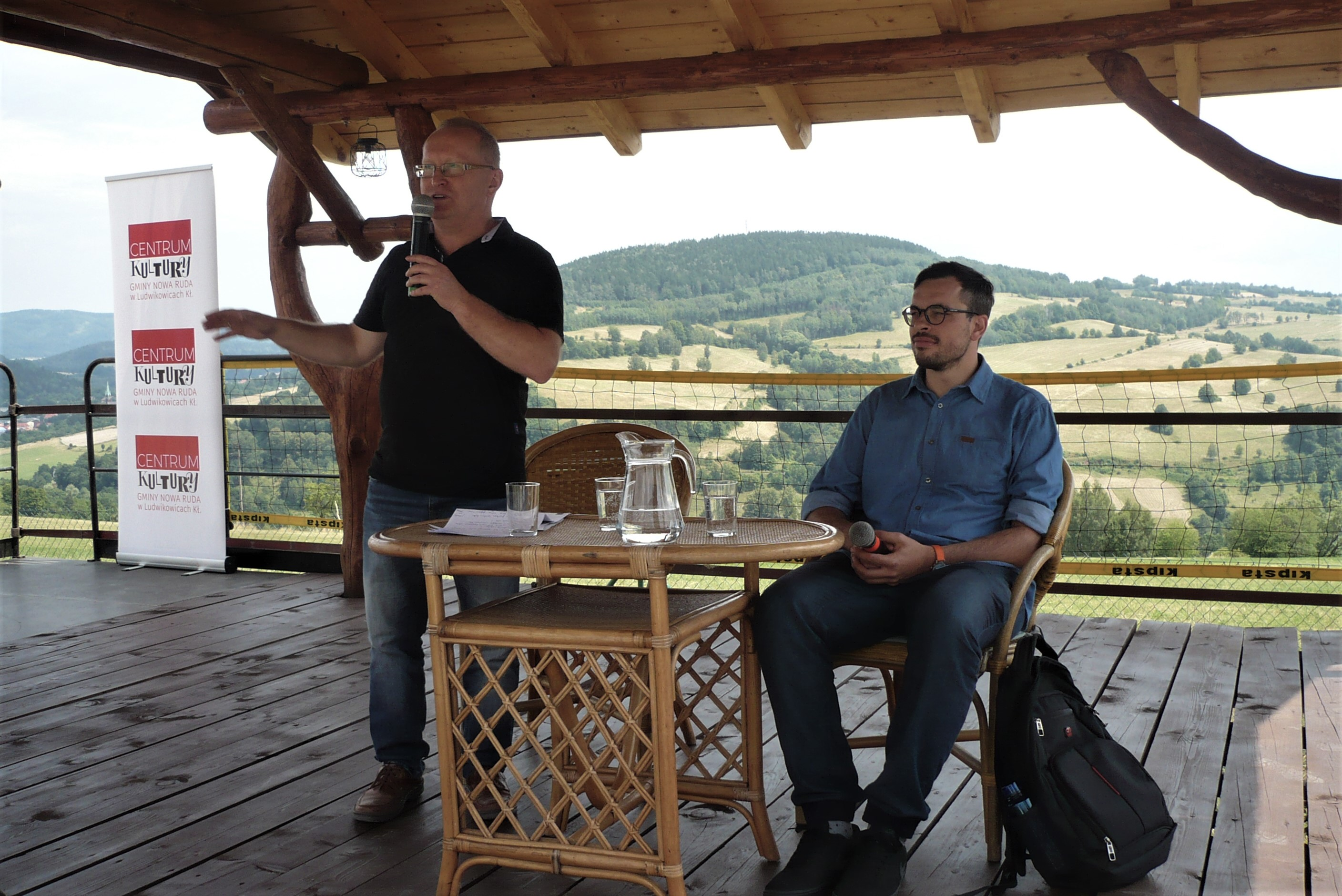 Karol Maliszewski (l), Paweł Mościcki, Festiwal Góry Literatury, 2019